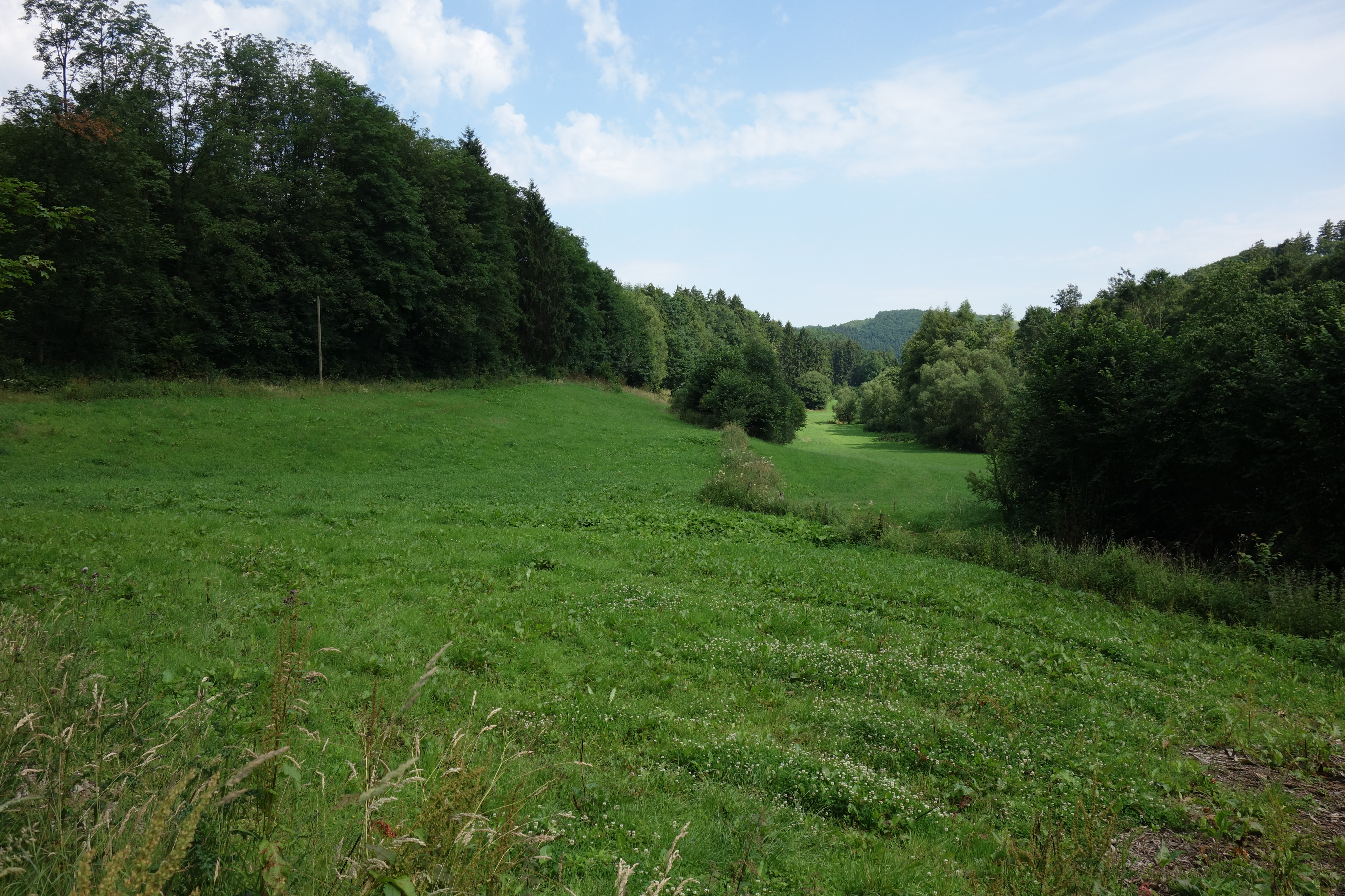 Grünland gehört zum Landschaftsschutzgebiet Talräume der Kleinen Henne zwischen Löttmaringhausen und Remblinghausen und Wald zum LSG Meschede.